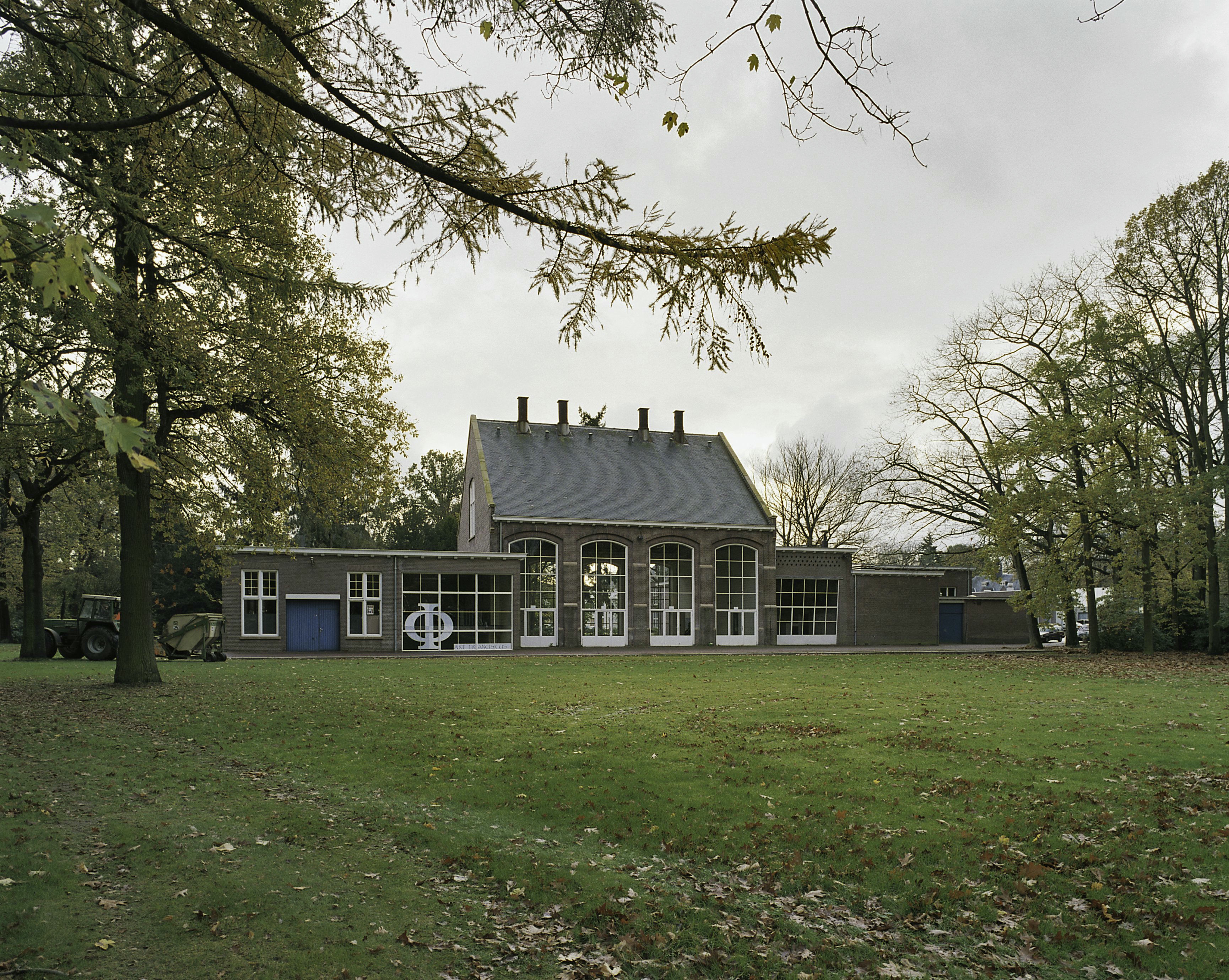 Rijks Krankzinnigengesticht De Grote Beek: Overzicht voorgevel ketelhuis